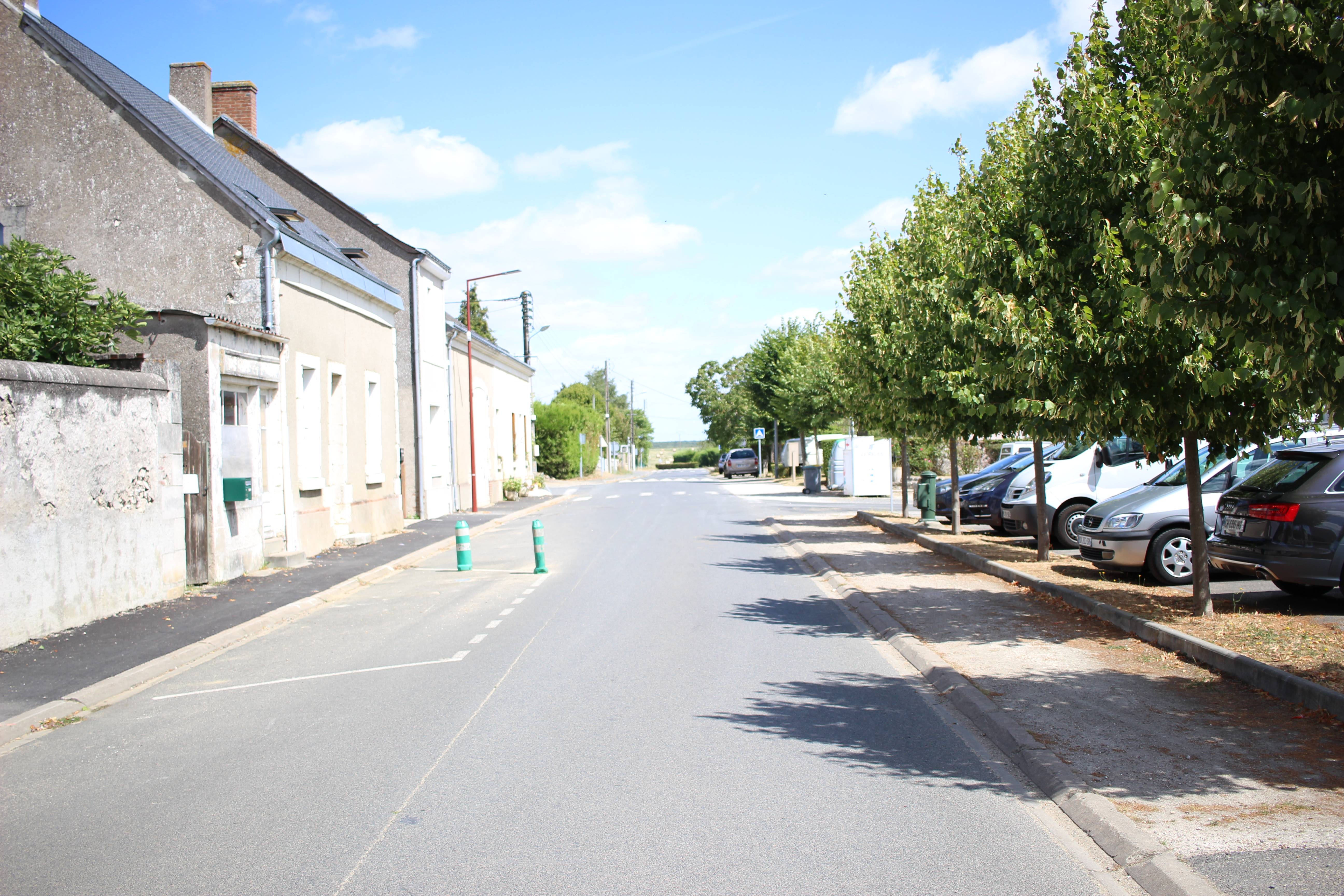 Rue centrale de Montreuil-en-Touraine (France).